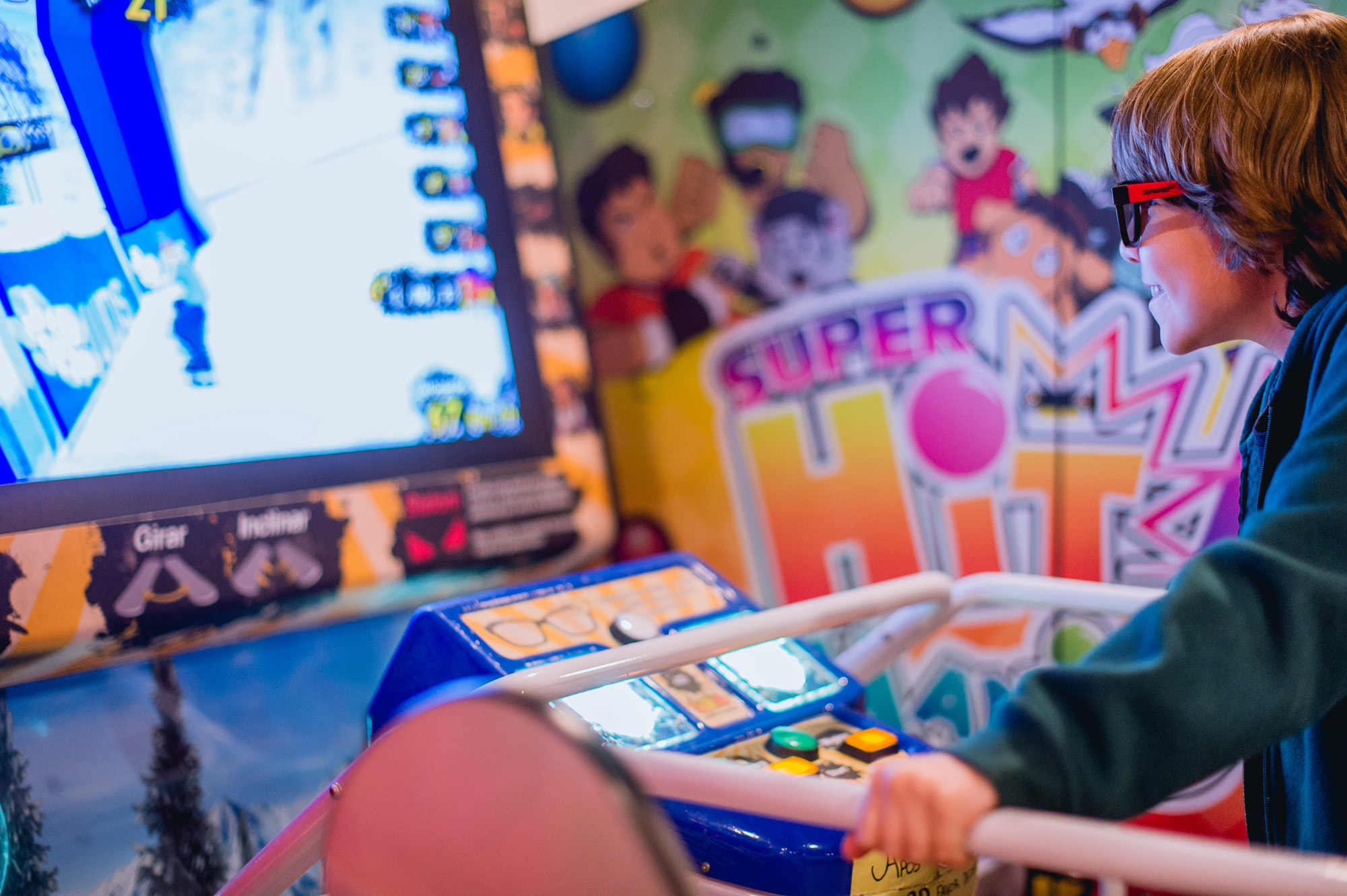 Viva a Neve!